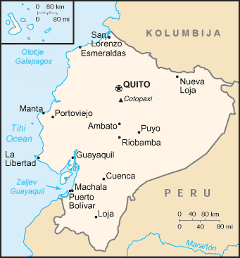 CIA Ecuador map, Croatina translation